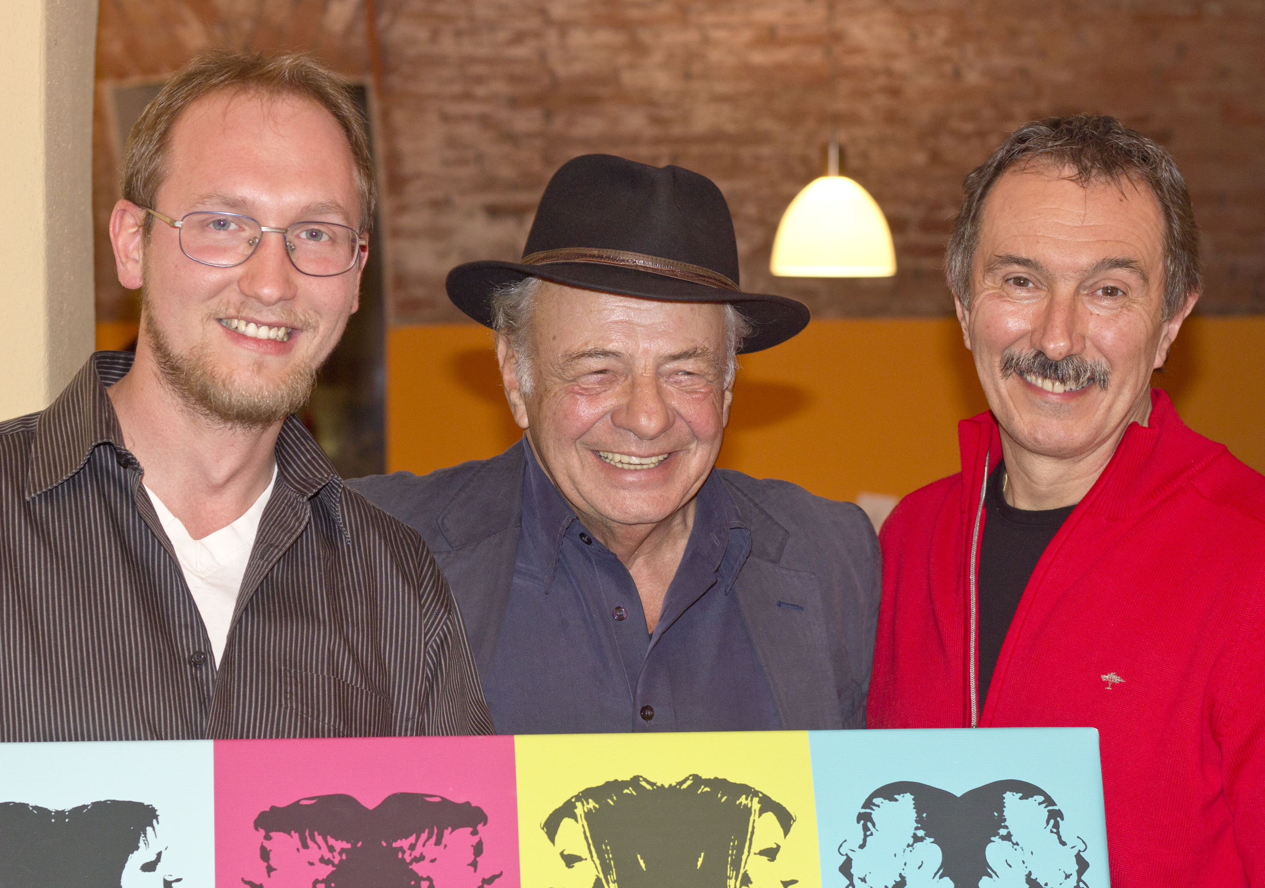 Autor Heinz R. Unger (Mitte) bei der Premiere des Stückes "Die Straße der Masken" mit Regisseur Markus Mudrak und Obmann Karl Rittler